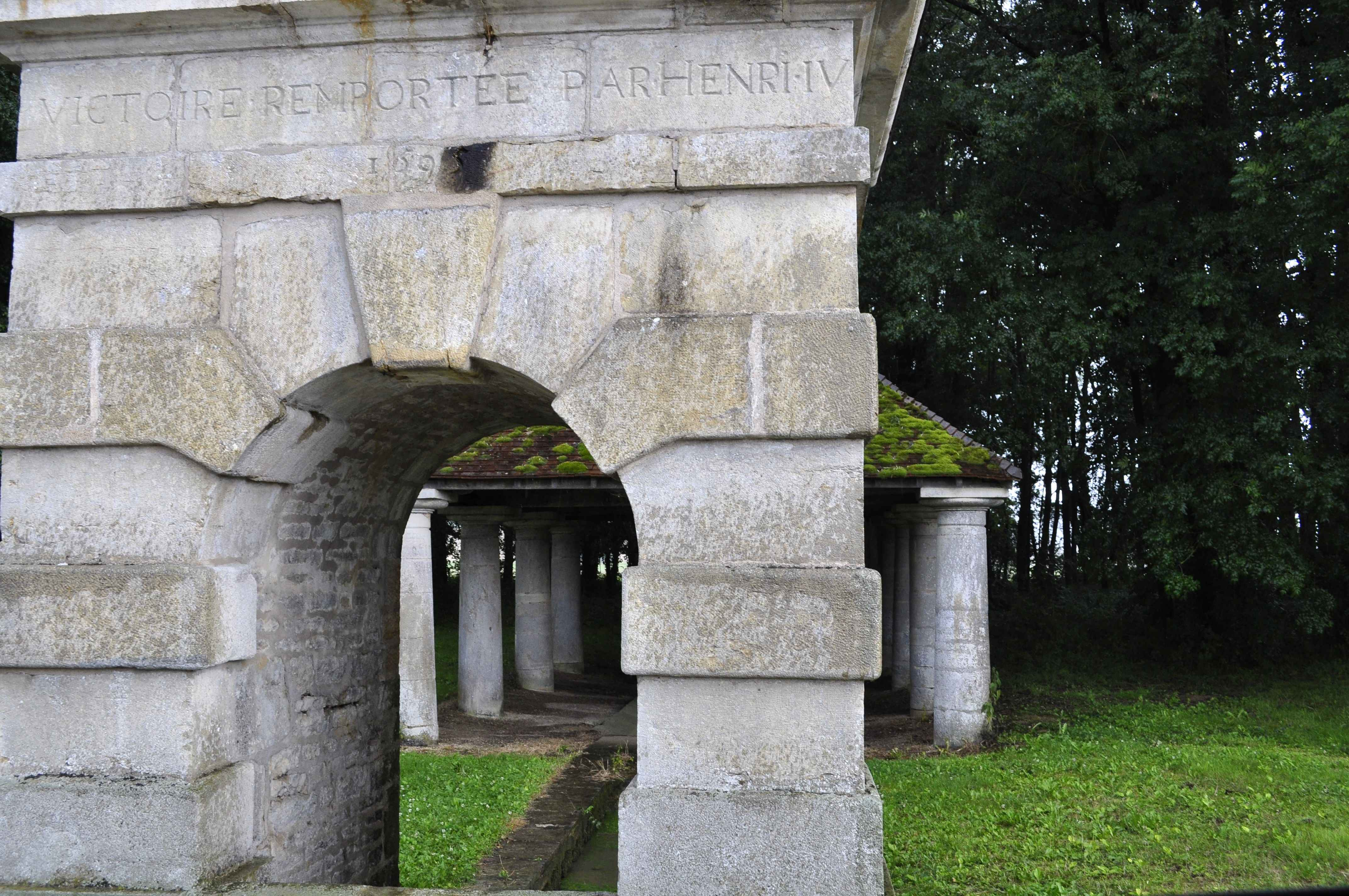 Monument commémoratif de la bataille de Fontaine-Française (Côte d'Or)